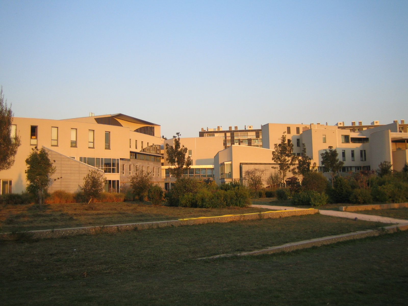 Vue des bâtiments de L'ENS-LSH